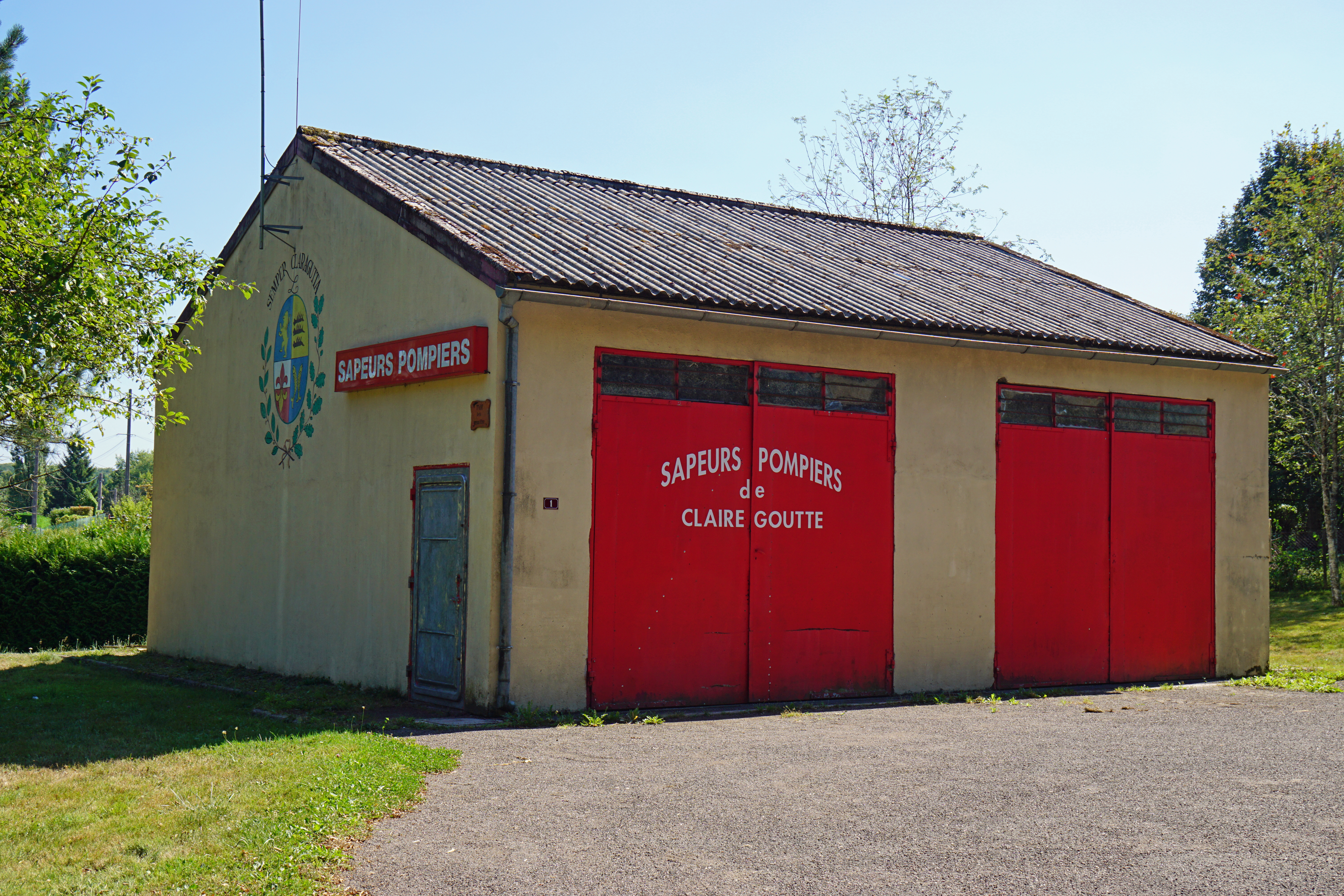 La caserne des pompiers de Clairegoutte.